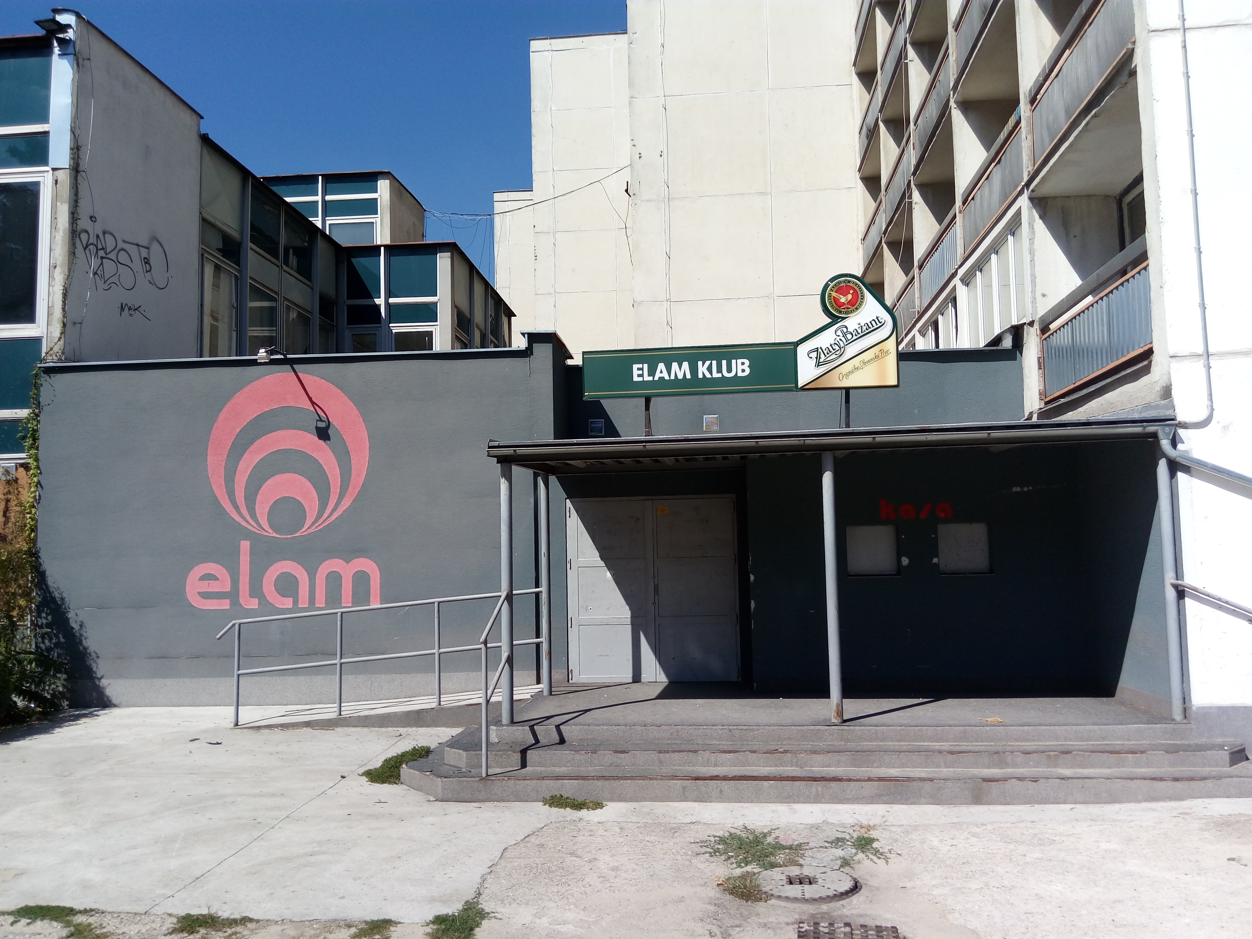 Klub Elam, Staré grunty, Karlova Ves, Bratislava